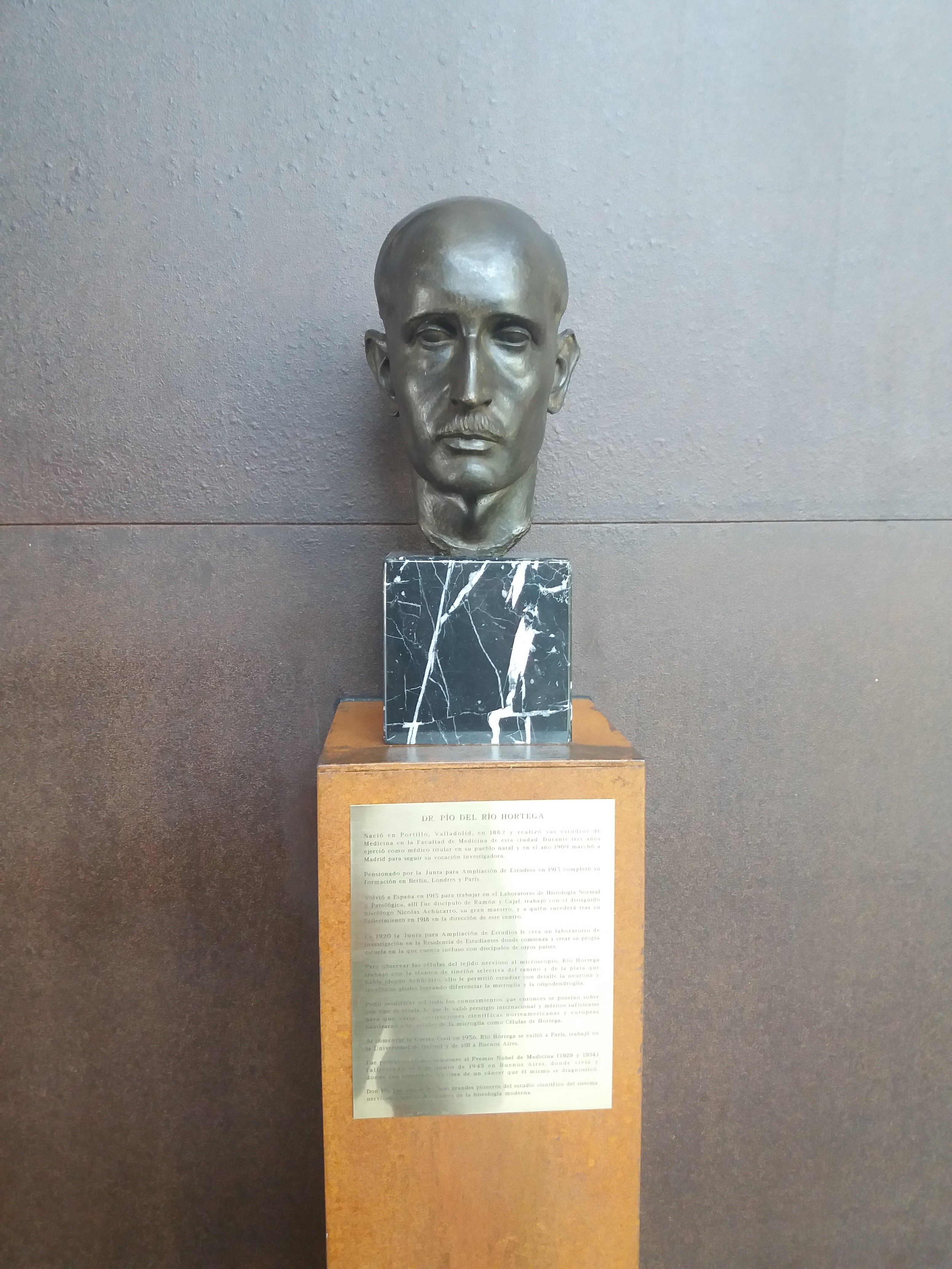 Busto de Pio del Río-Hortega en el hall principal del hospital HURH en Valladolid (España)